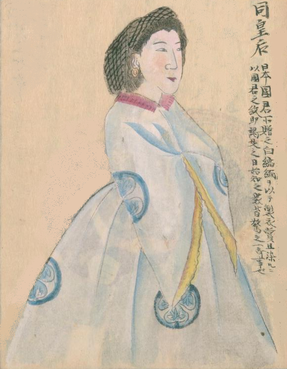 マリア・アレクサンドロヴナ (ロシア皇后) 高嶋祐啓『欧西行紀』